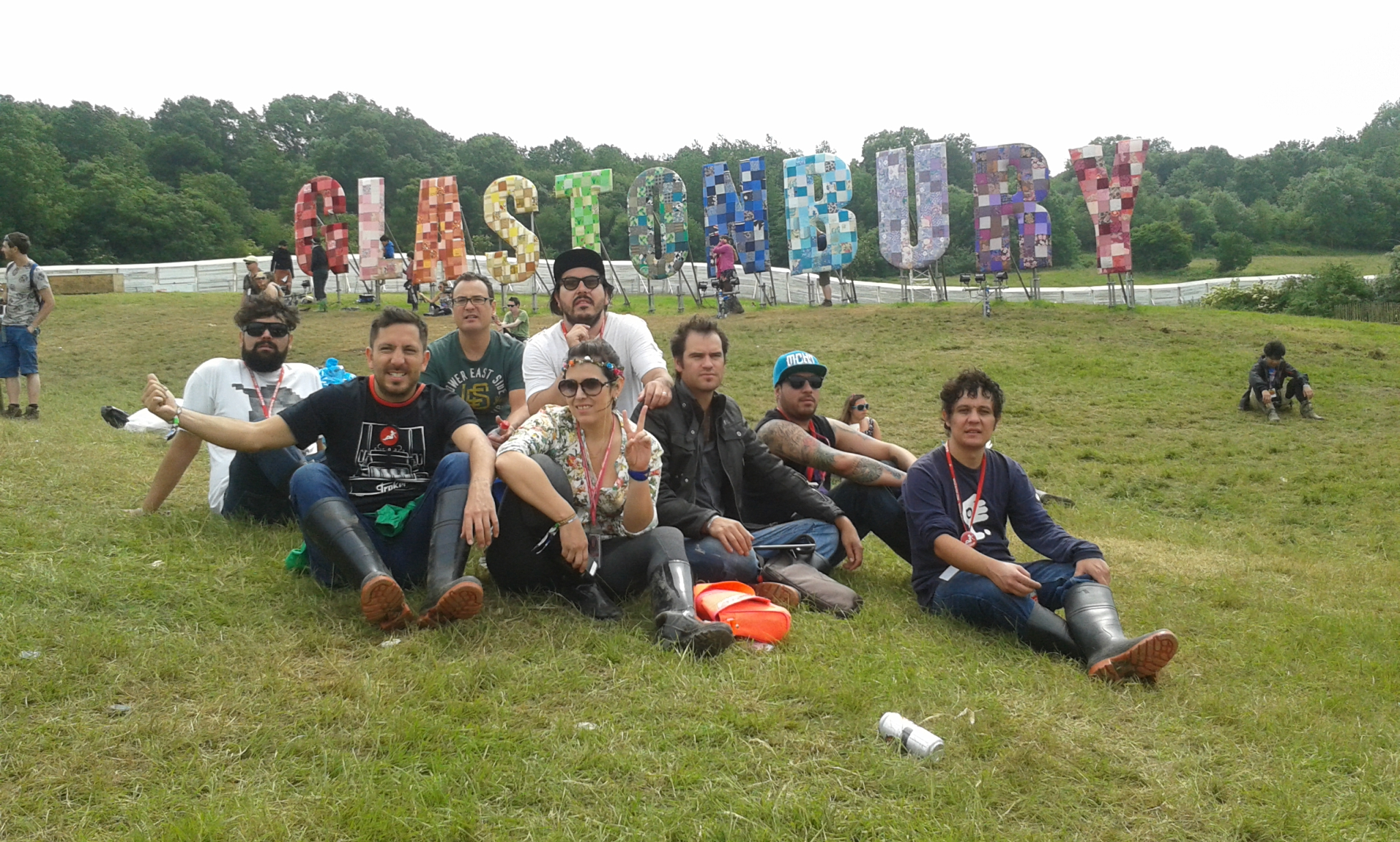 Troker con su manager en el Festival Glastonbury donde tocaron en junio del 2013.